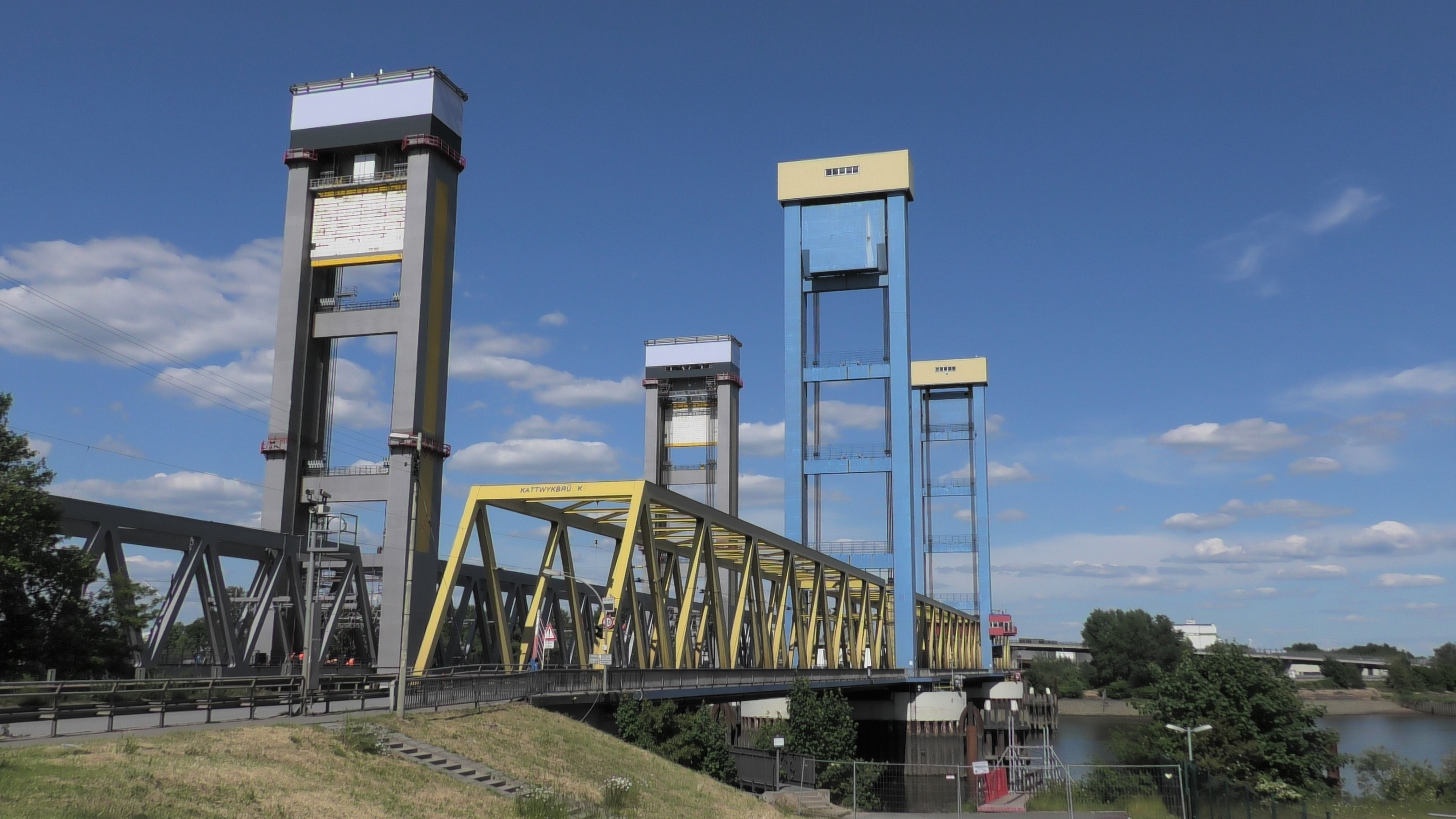 Auf dem Bild ist die neue und die alte Kattwykbrücke in Moorburg zu sehen.